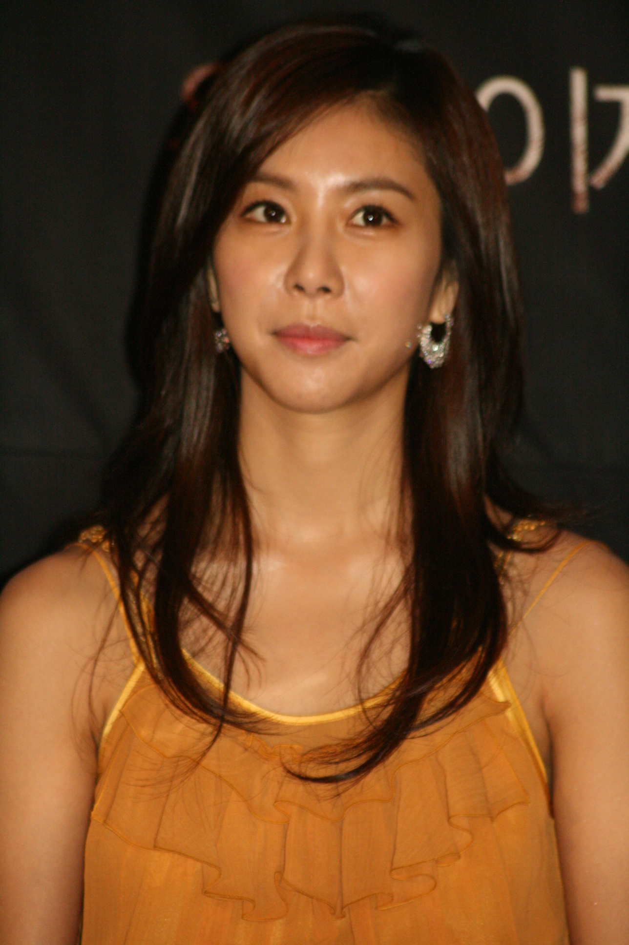 기생령 시사회